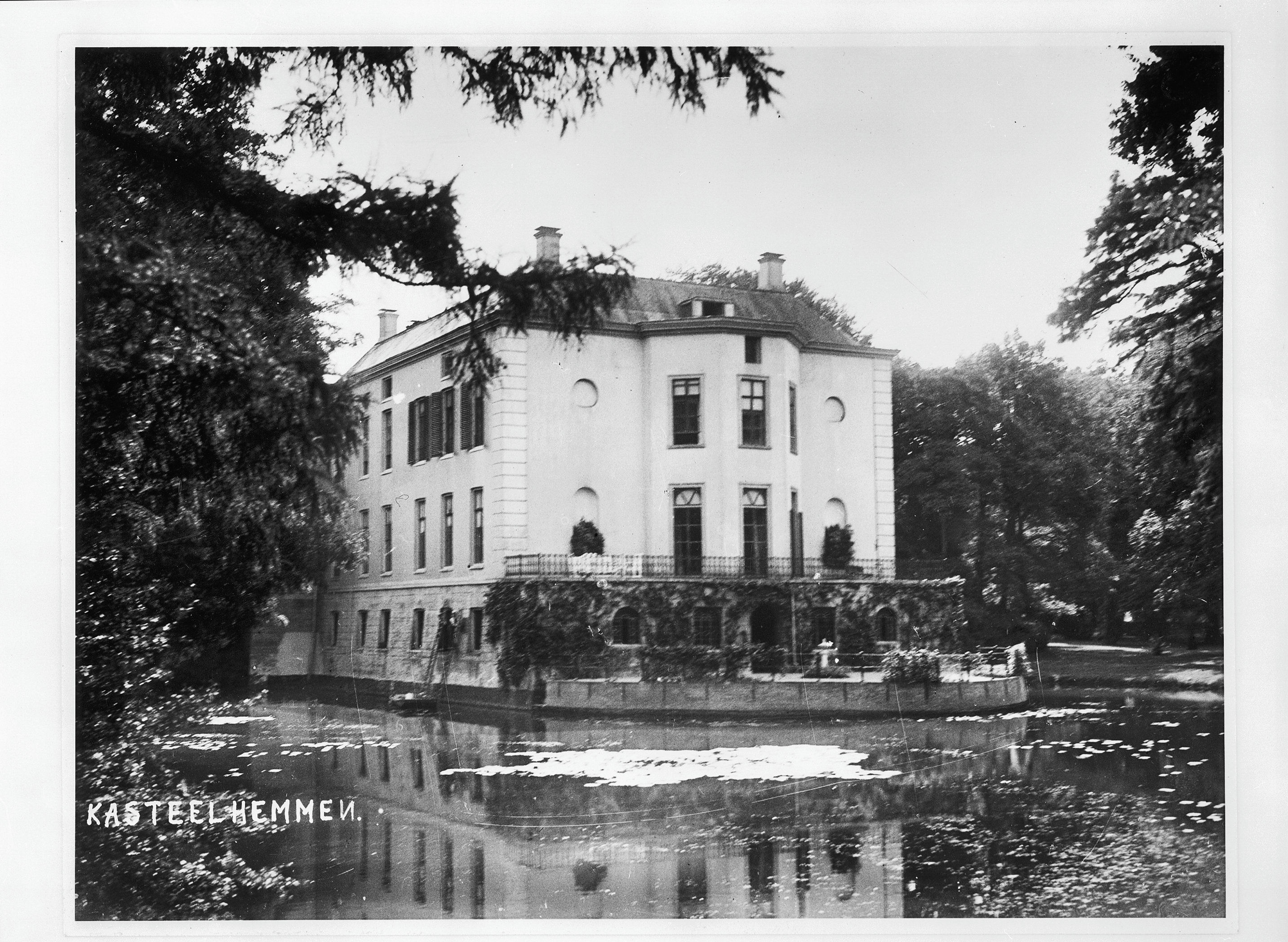 Kasteel Hemmen: overzicht